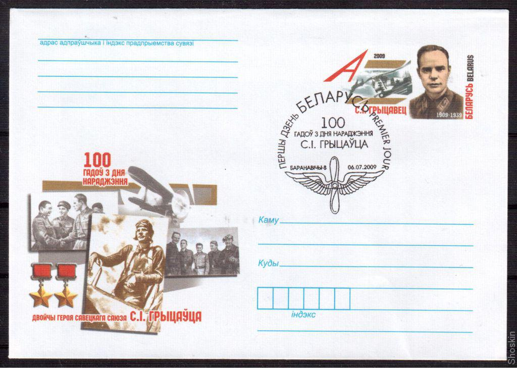 Грыцавец Сяргей Іванавіч канверт